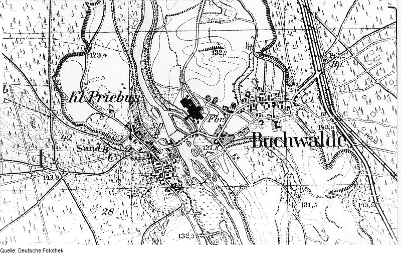 Original image description from the Deutsche Fotothek Krauschwitz-Klein Priebus. Meßtischblatt, Sekt. Priebus, 1940